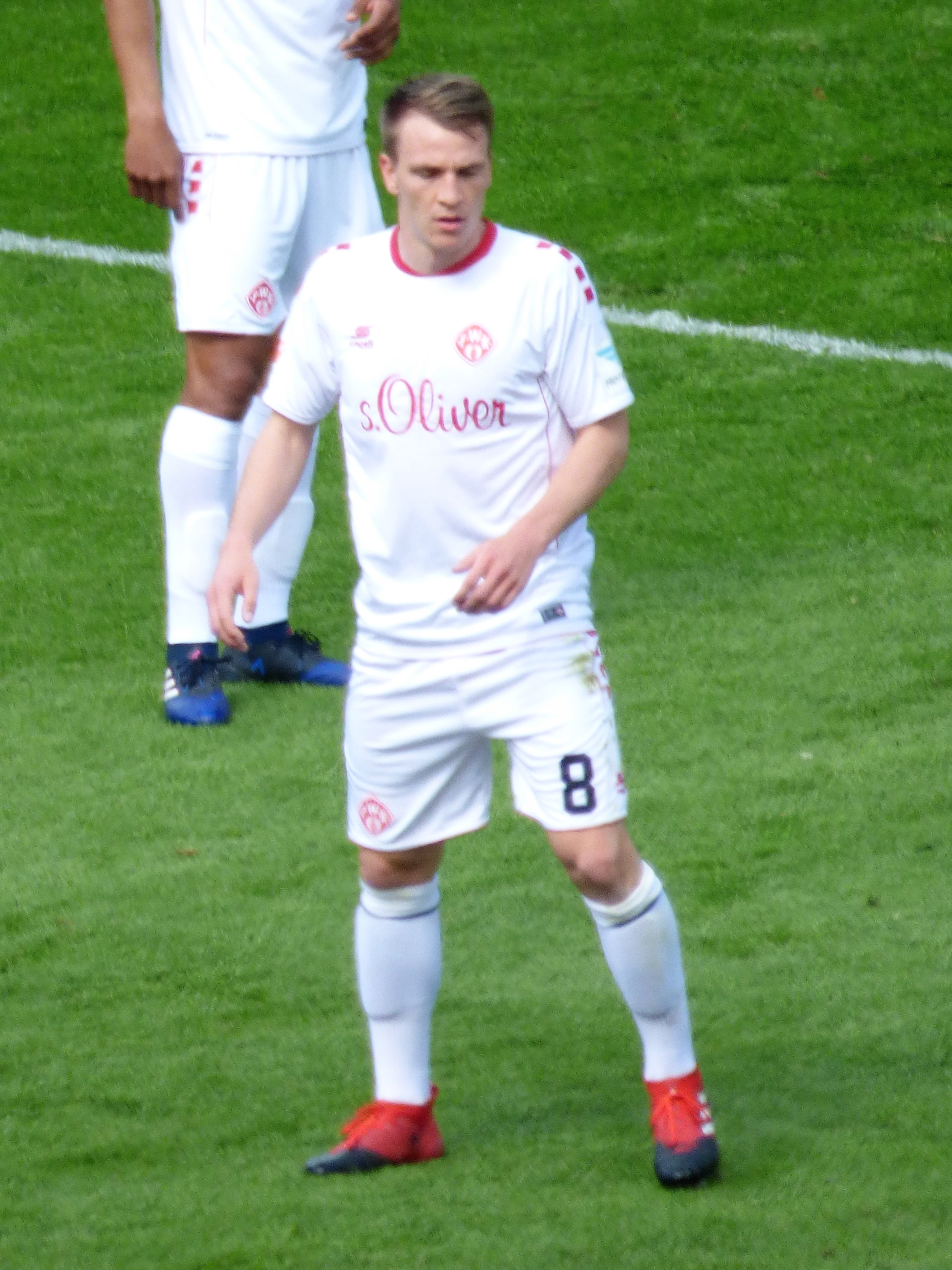 Emanuel Taffertshofer 2017